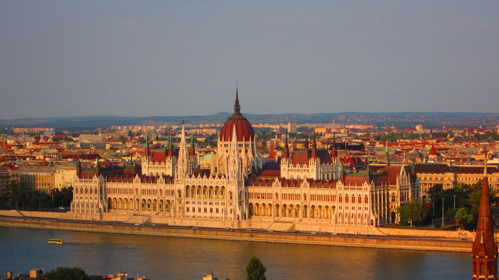 Országház (Budapest 5, Kossuth Lajos tér 1-3., Széchenyi István rakpart 11.) This is a photo of a monument in Hungary. Identifier: 509